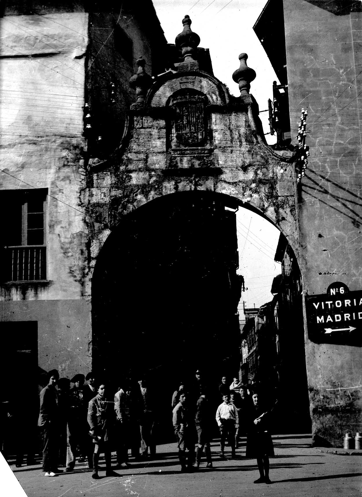 Arrasateko portaloia urte ezezagunean. Argazkia Gipuzkoako Foru Aldundiko Kultura eta Euskara Departamentuaren atarian eskuratu daiteke